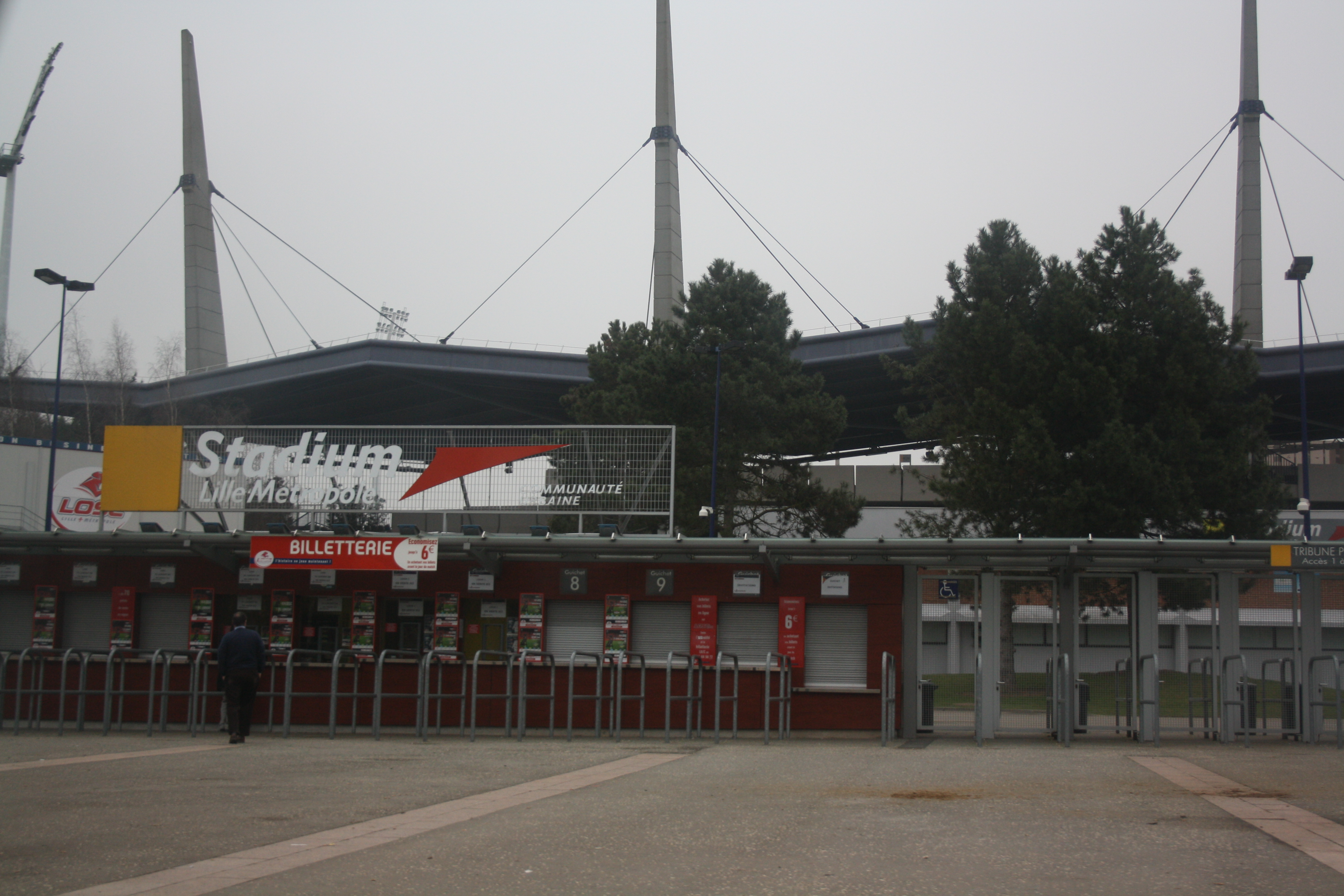 Entrée du stadium Nord Lille Métropole à Villeneuve d'Ascq (France).